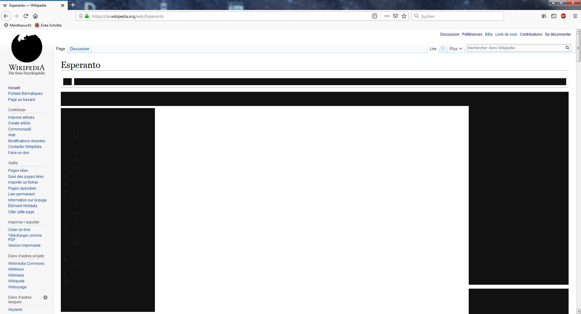 Vikipedio germana la 21-an de marto 2019